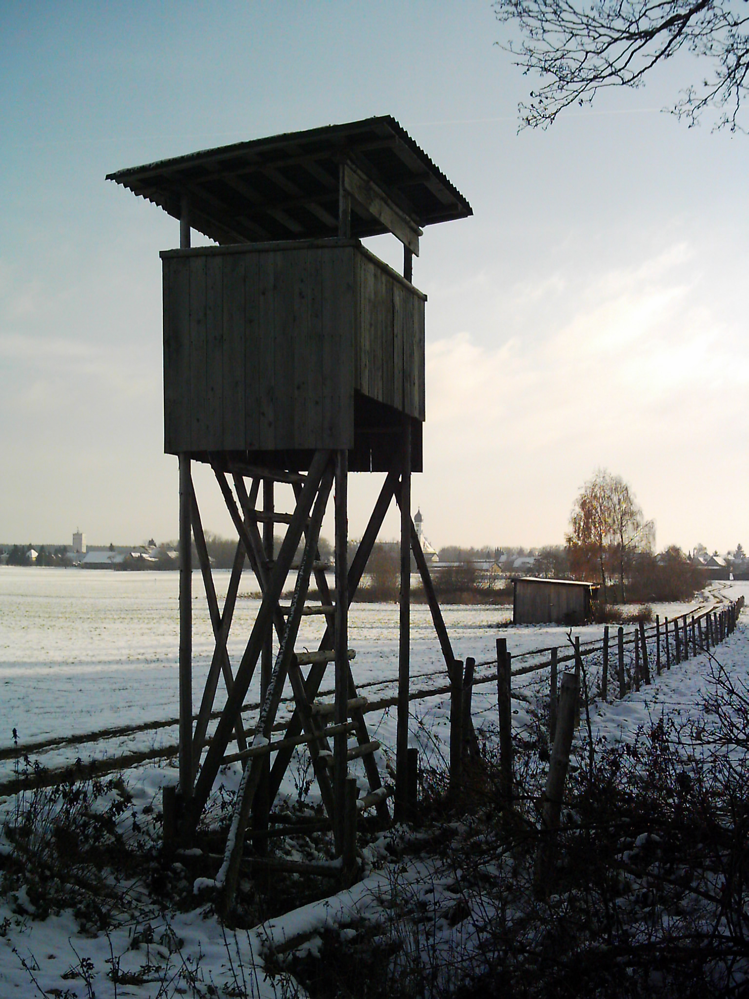 Hochsitz in Deutschland